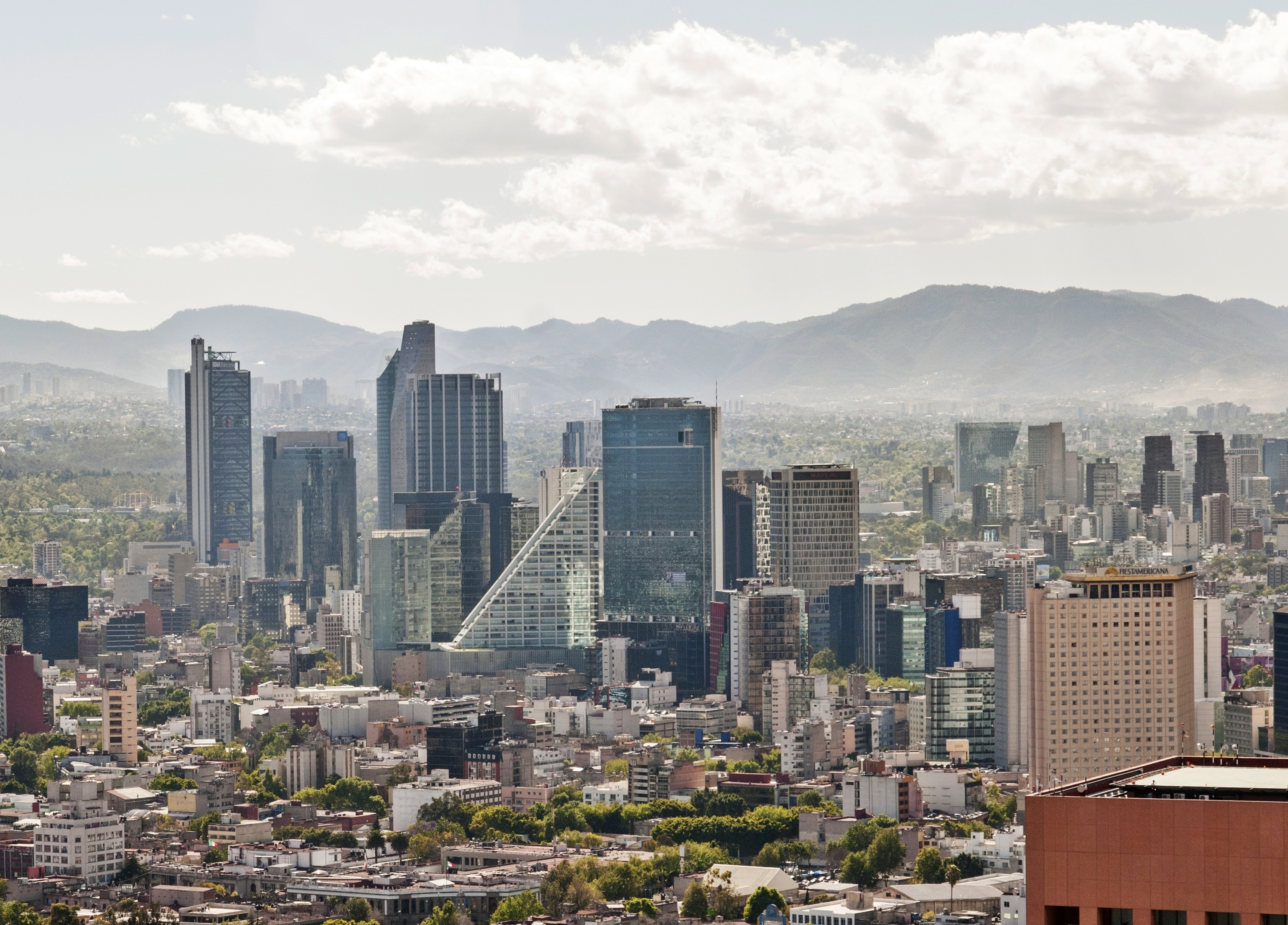 Skyline CDMX 2016